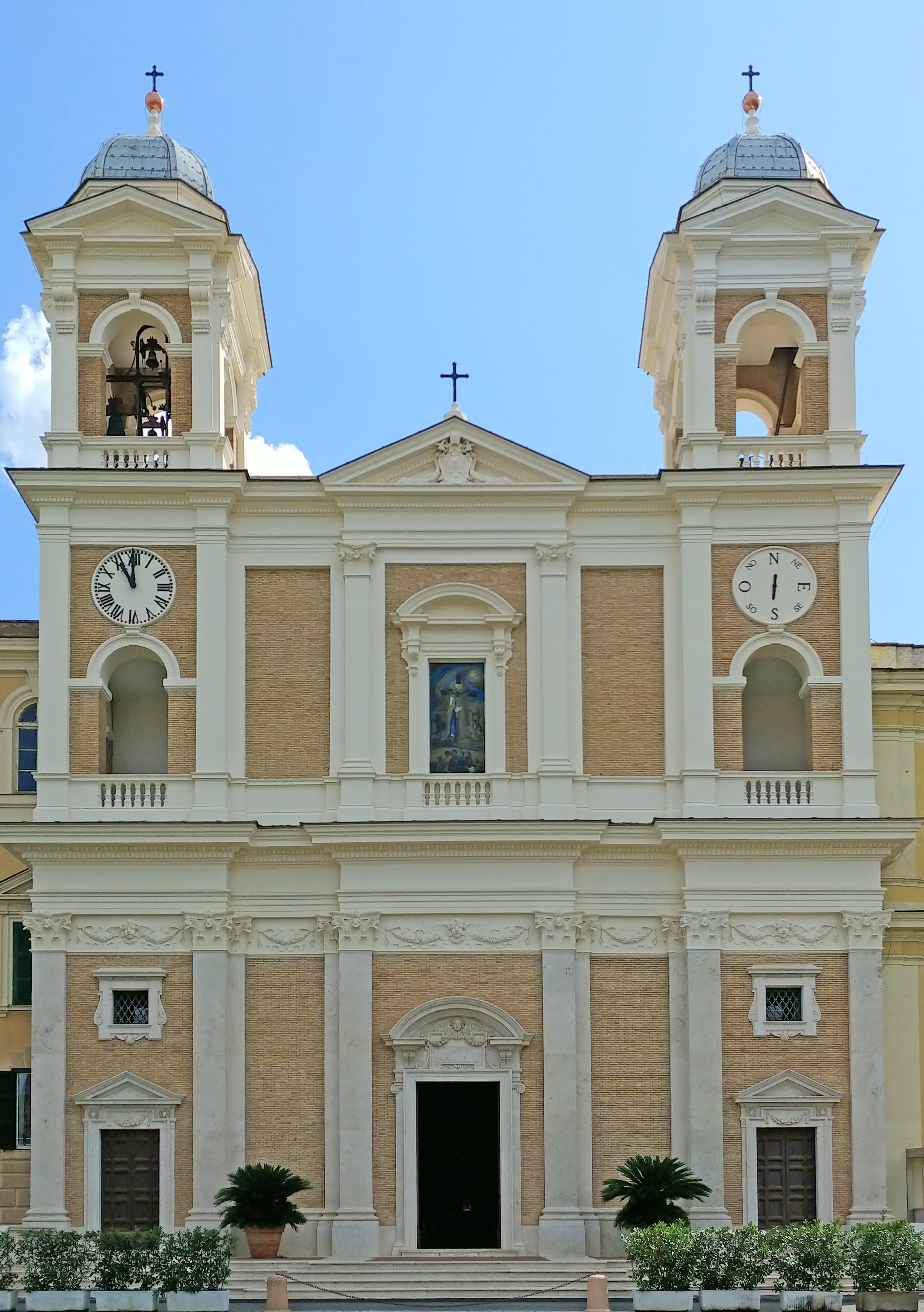 Facciata.